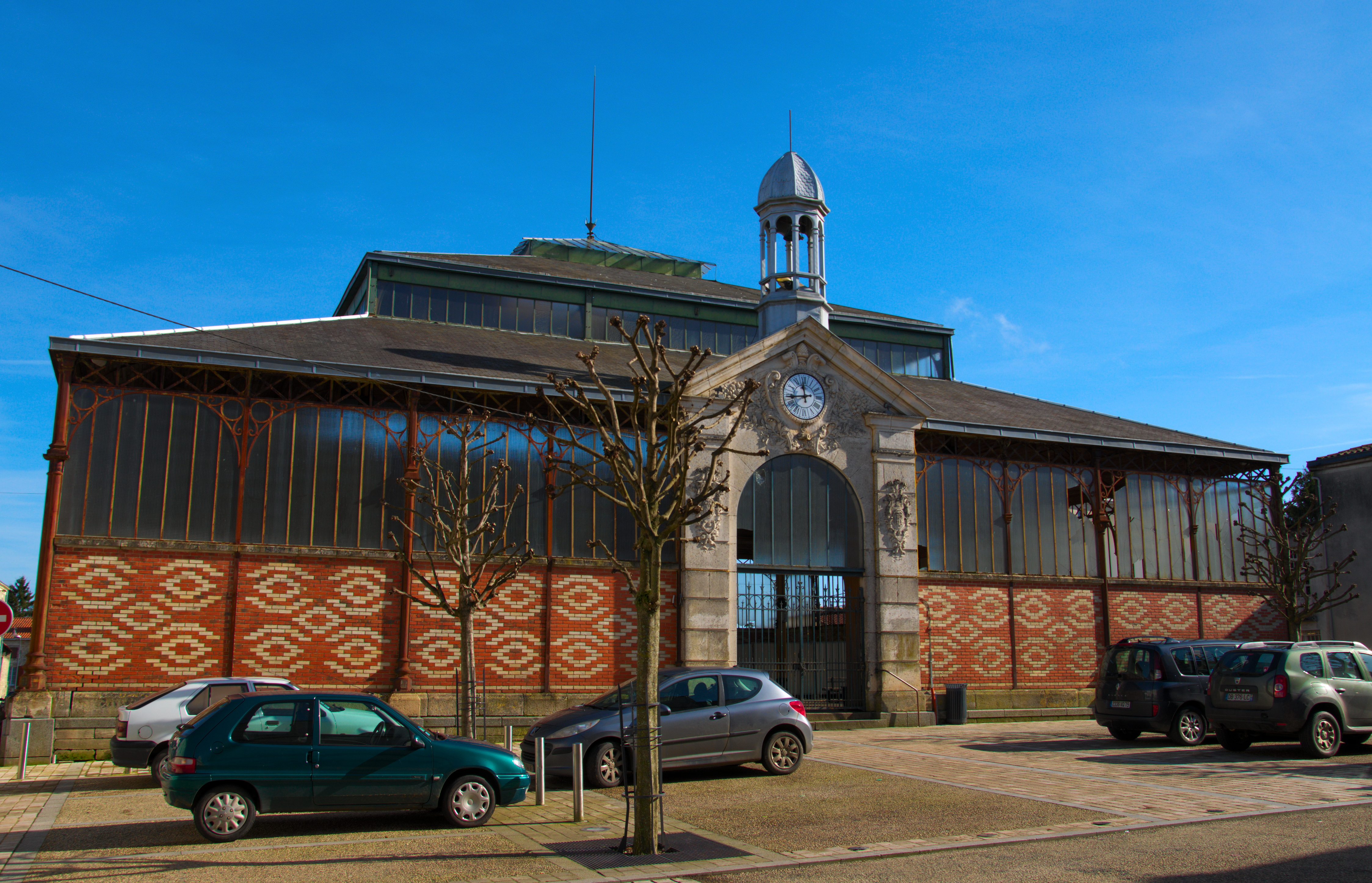 Coulonges sur l'Autize